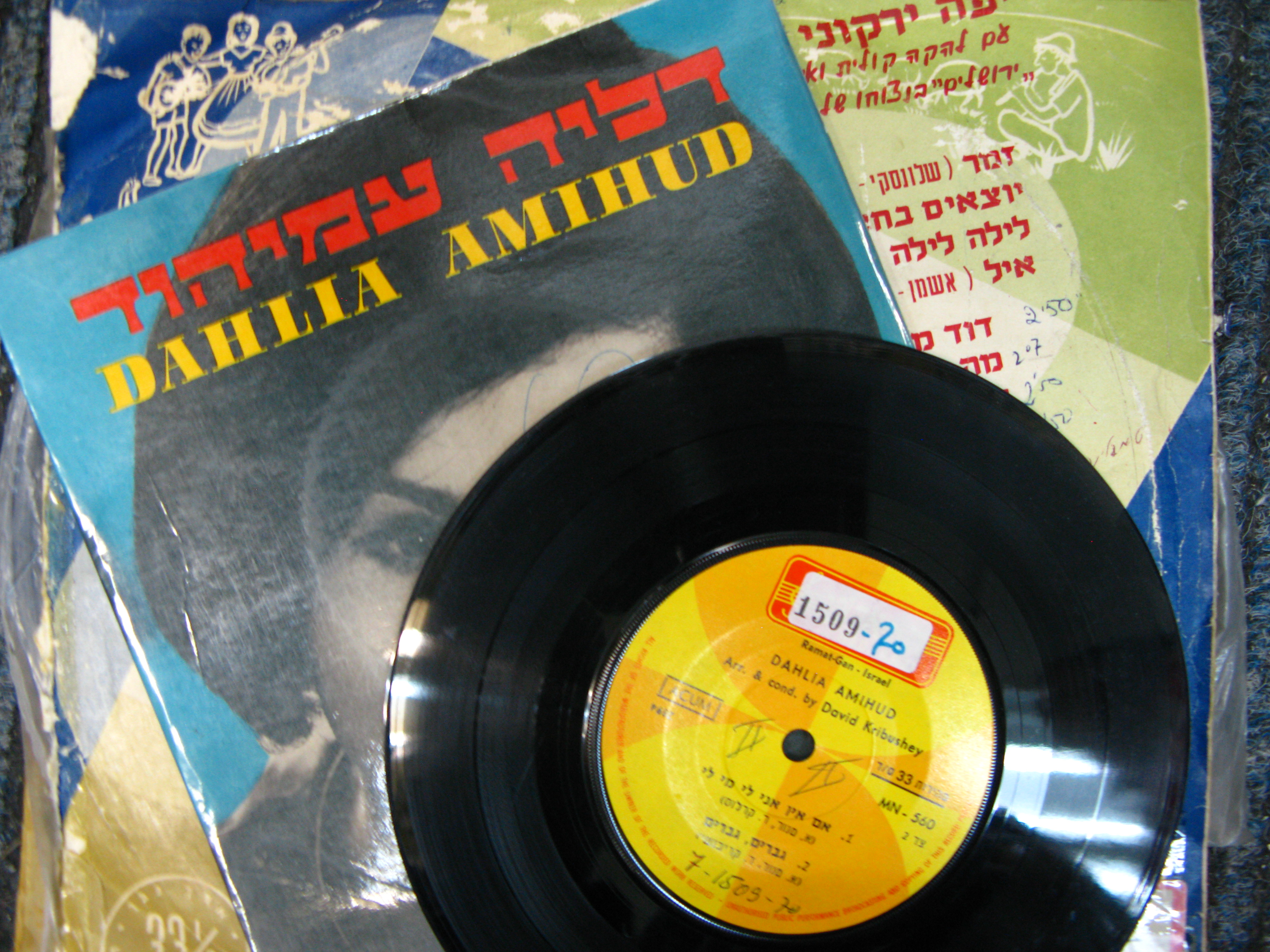 בניין קול ישראל ברחוב הלני המלכה בירושלים, משמש את תחנת הרדיו "קול ישראל" מאז ימי הרדיו המנדטורי ב-1939, ולסגירת רשות השידור.